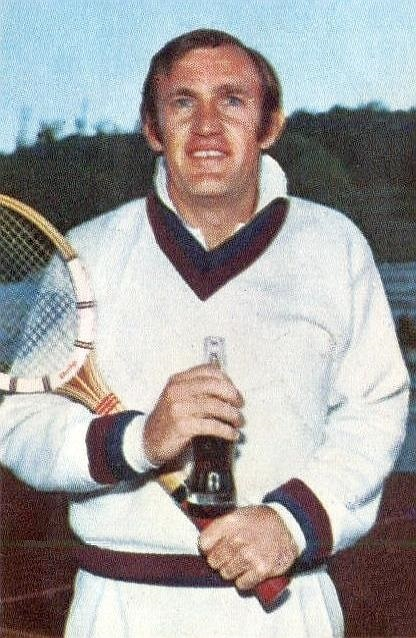 Tony Roche en 1970, 'Campioni dello Sport 1970 - 1971, n°334.